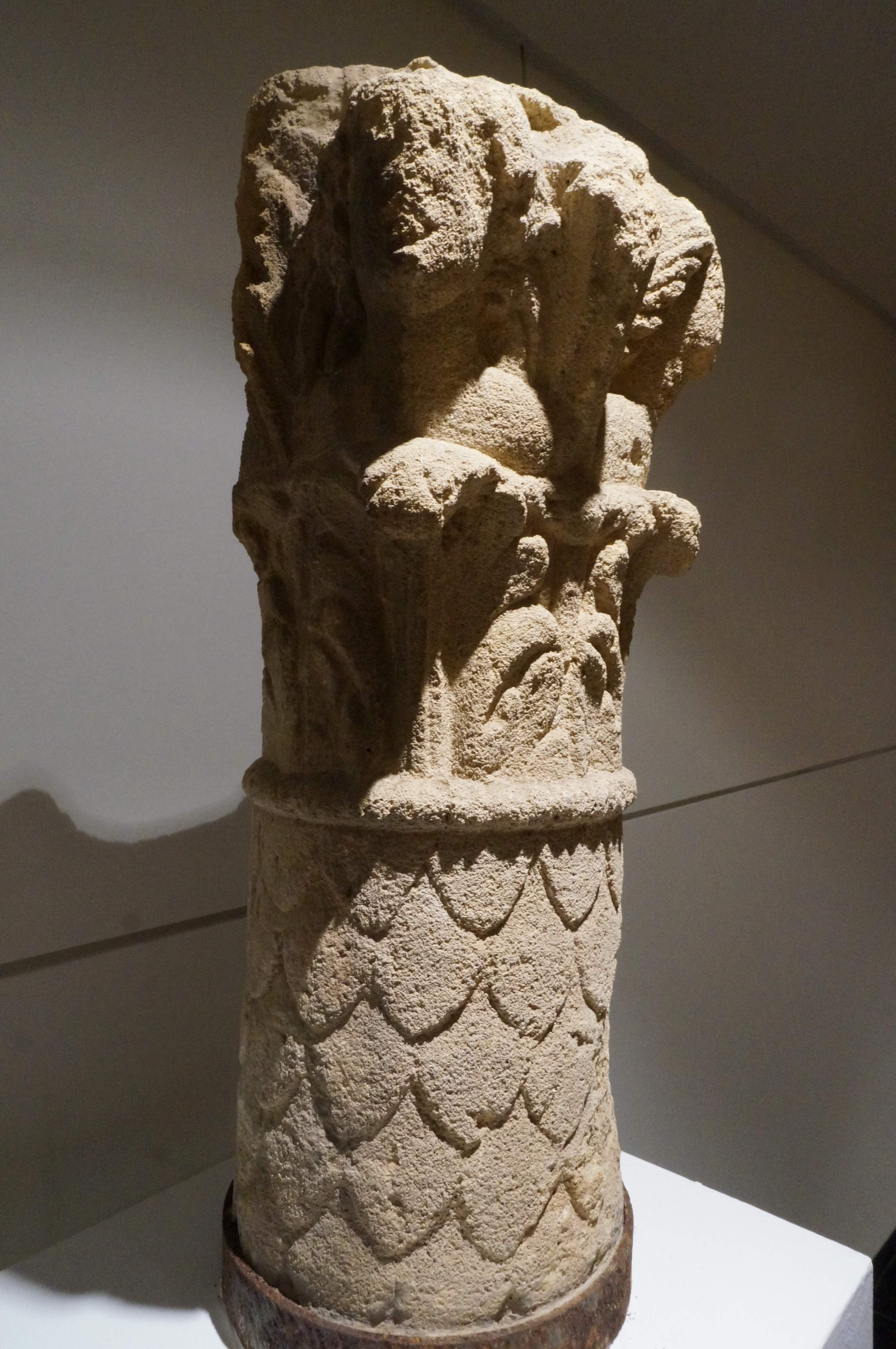 trouvé lors de fouilles archéologiques.